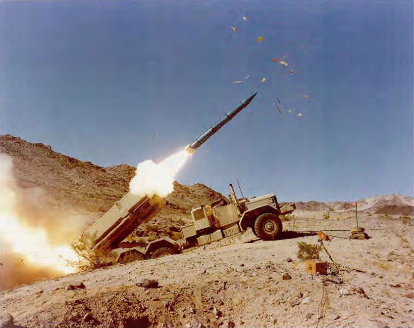 מערכת "קרס" של חיל האוויר הישראלי, המותקנת על משאית "ריאו", יורה טיל "אגרוף סגול" מתביית קרינת מכ"ם (AGM-78 standard ARM), שהייתה בשימוש טייסת 153.